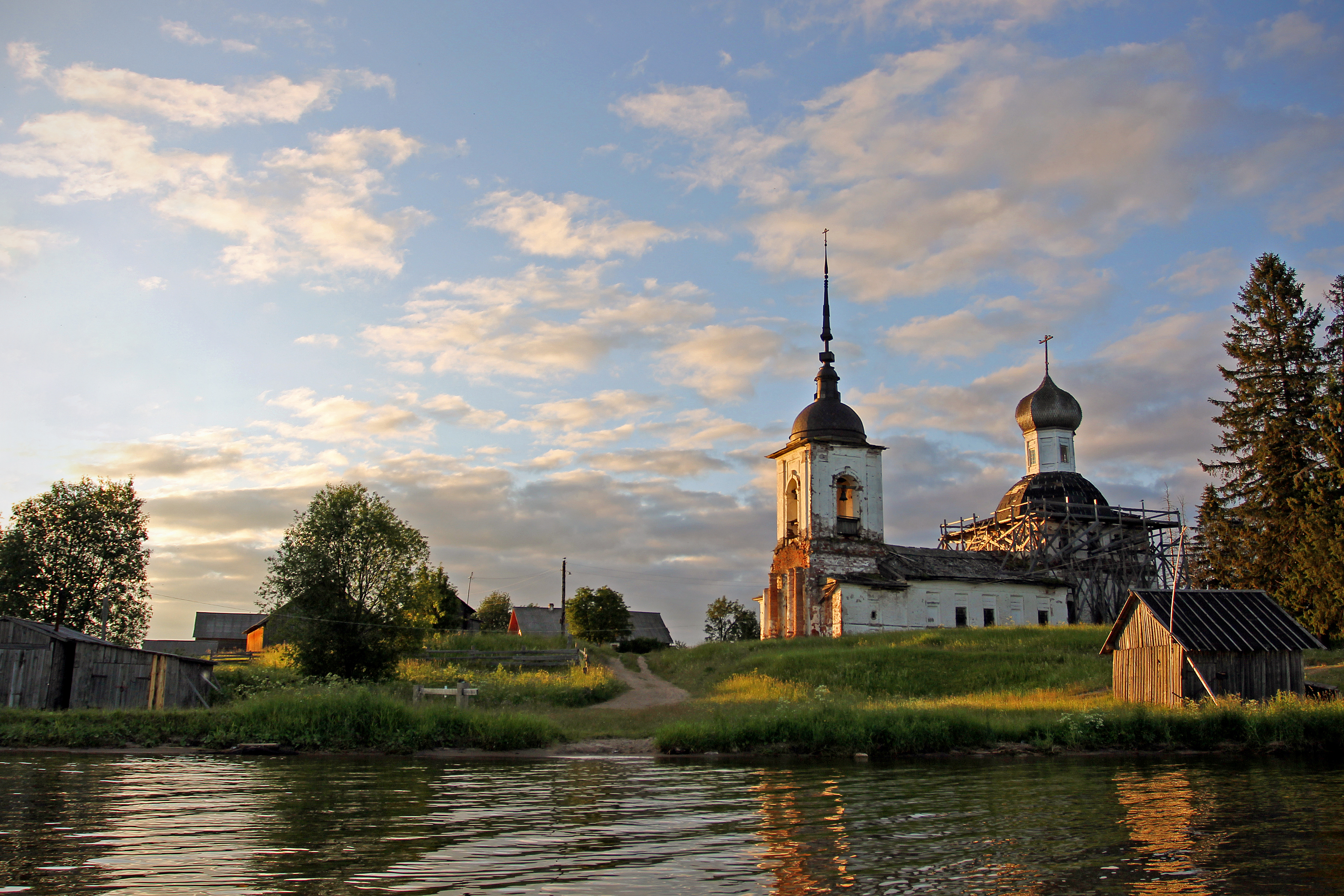 Церковь святых апостолов Петра и Павла, XIX век . Д. Морщихинская (берег оз.Лёкшмозера), Кенозерский национальный парк. Условия фото: фокусное расстояние - 17 мм, ISO-100, выдержка - 1/400 с, диафрагма - f/4, экспокоррекция +0.3 шаг.